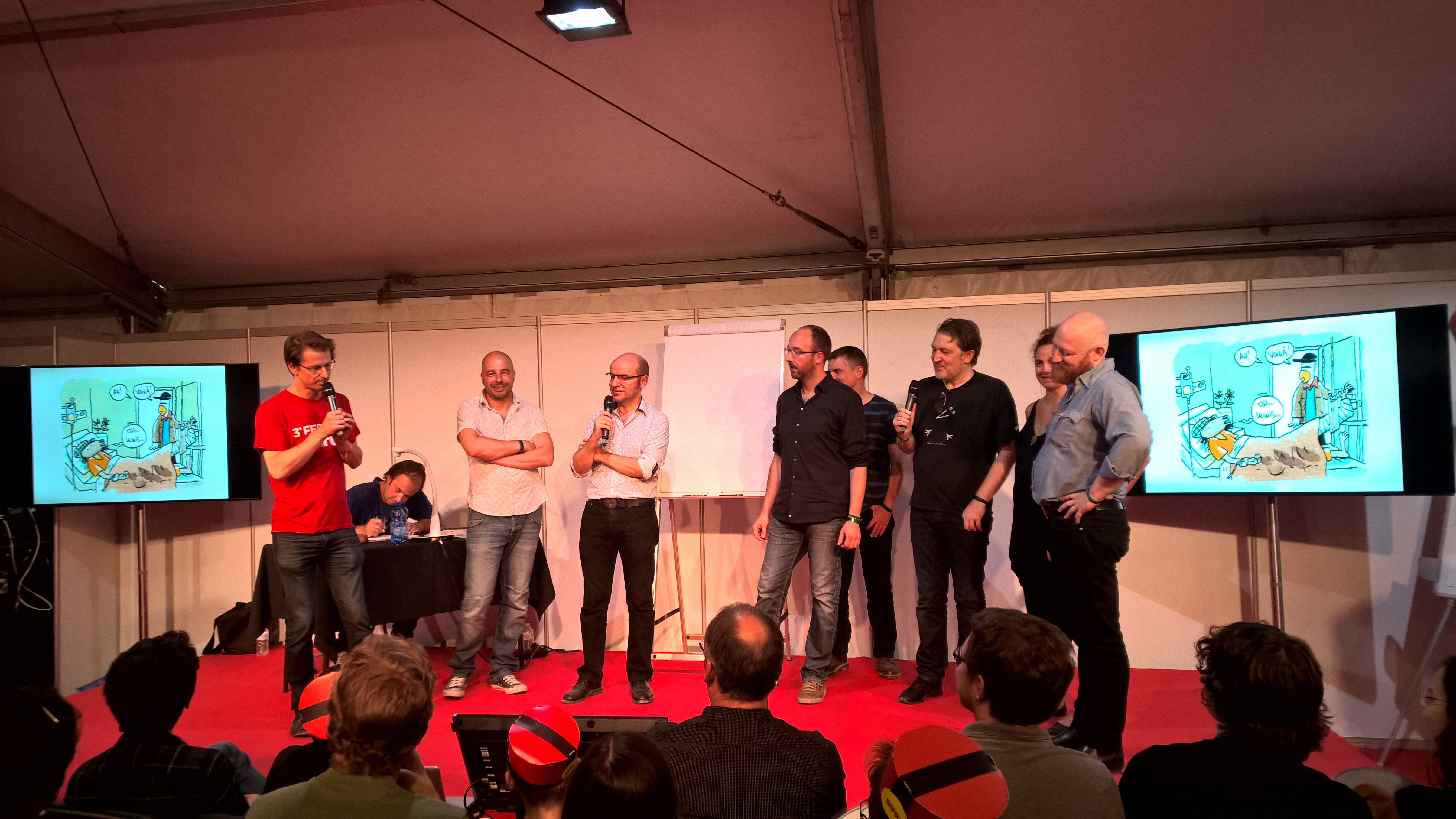 Show de L'Atelier Mastodonte lors du festival Spirou 2016.